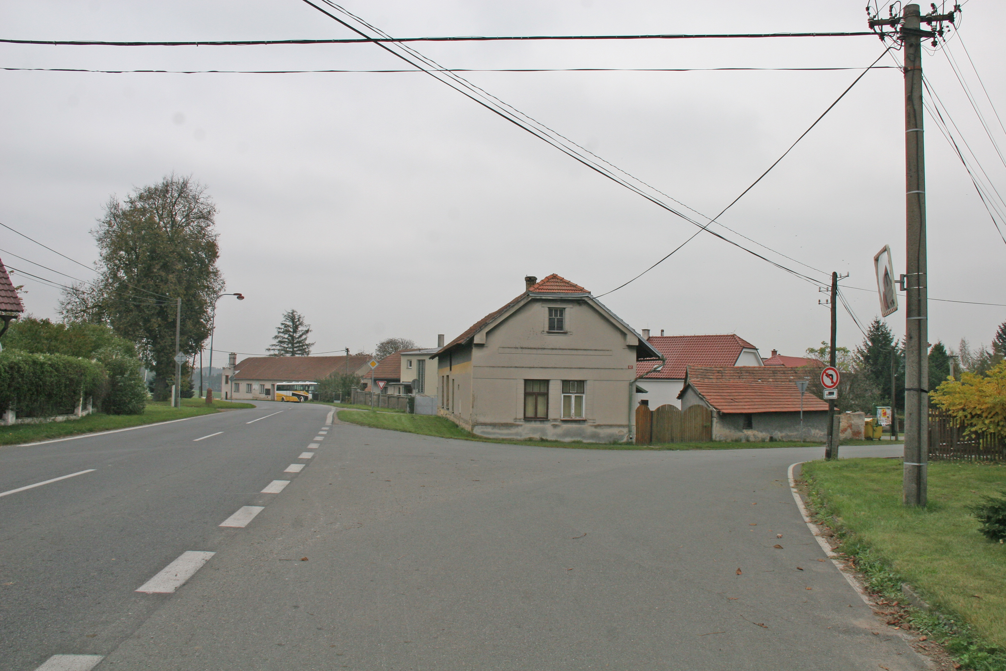 Uhlířská Lhota čp. 62